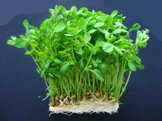 豆苗の写真